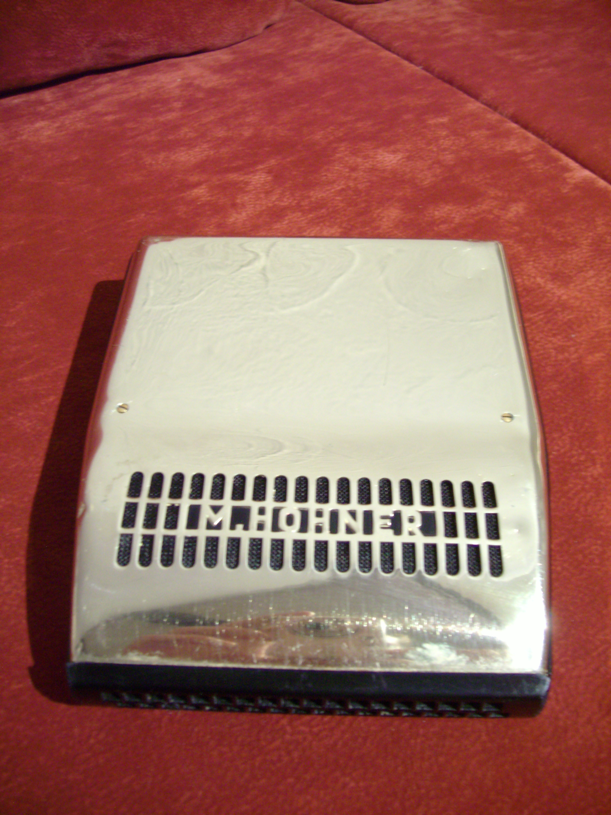 Harmonetta Rückseite